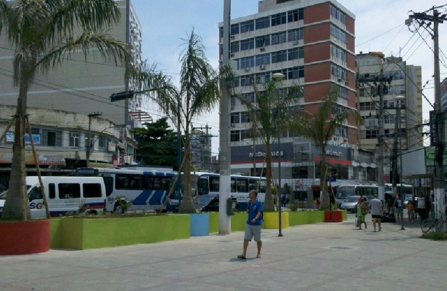 Centro de SG